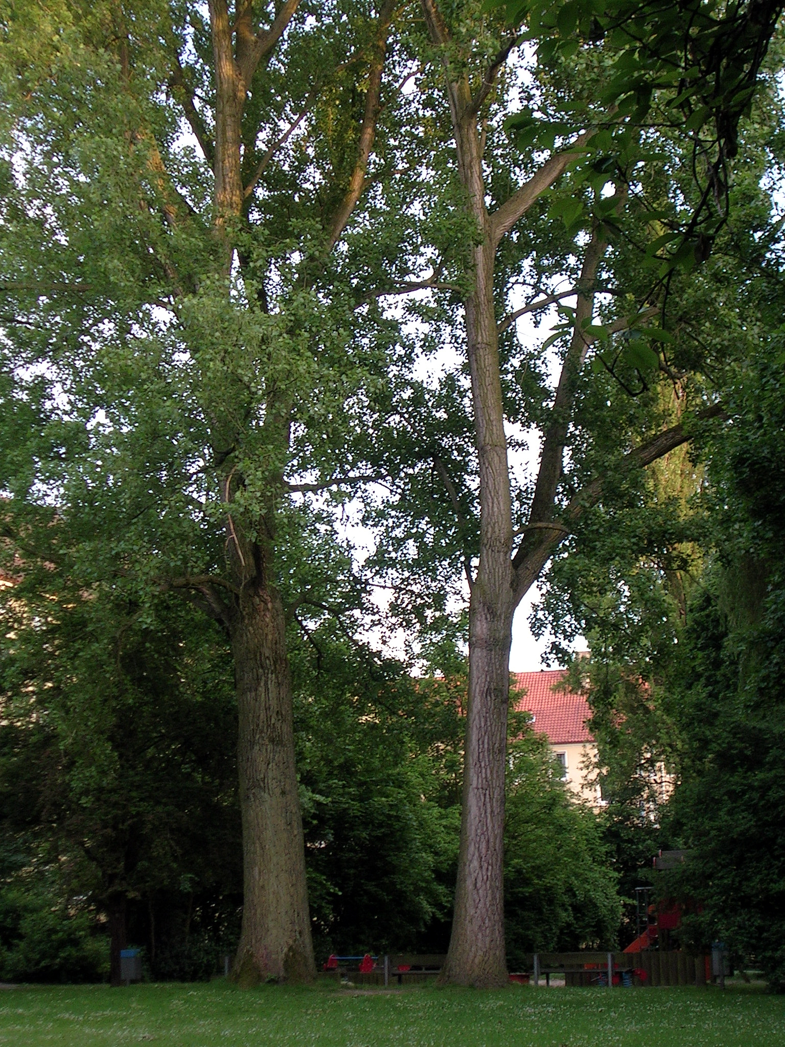 Dortmund, Althoffblock, Innenhof